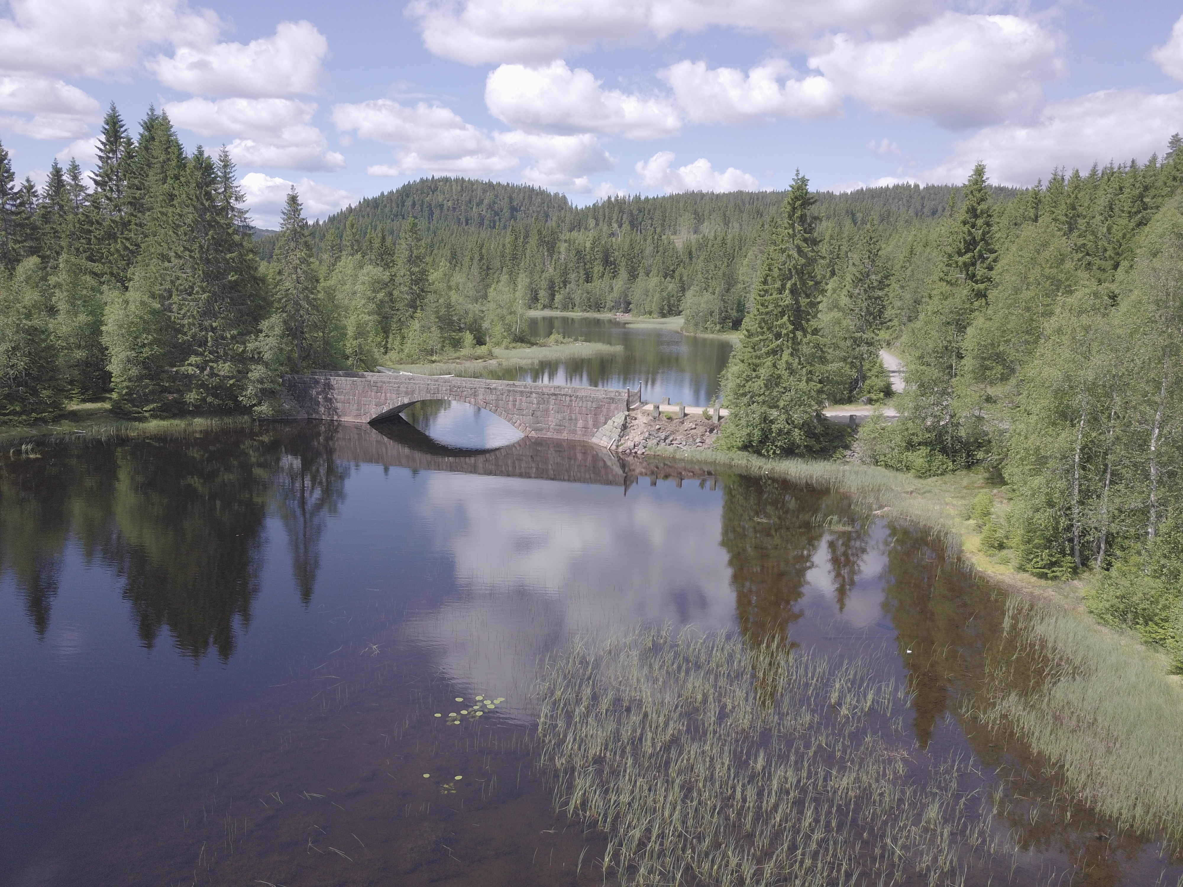 Råsjøen i Romeriksåsen